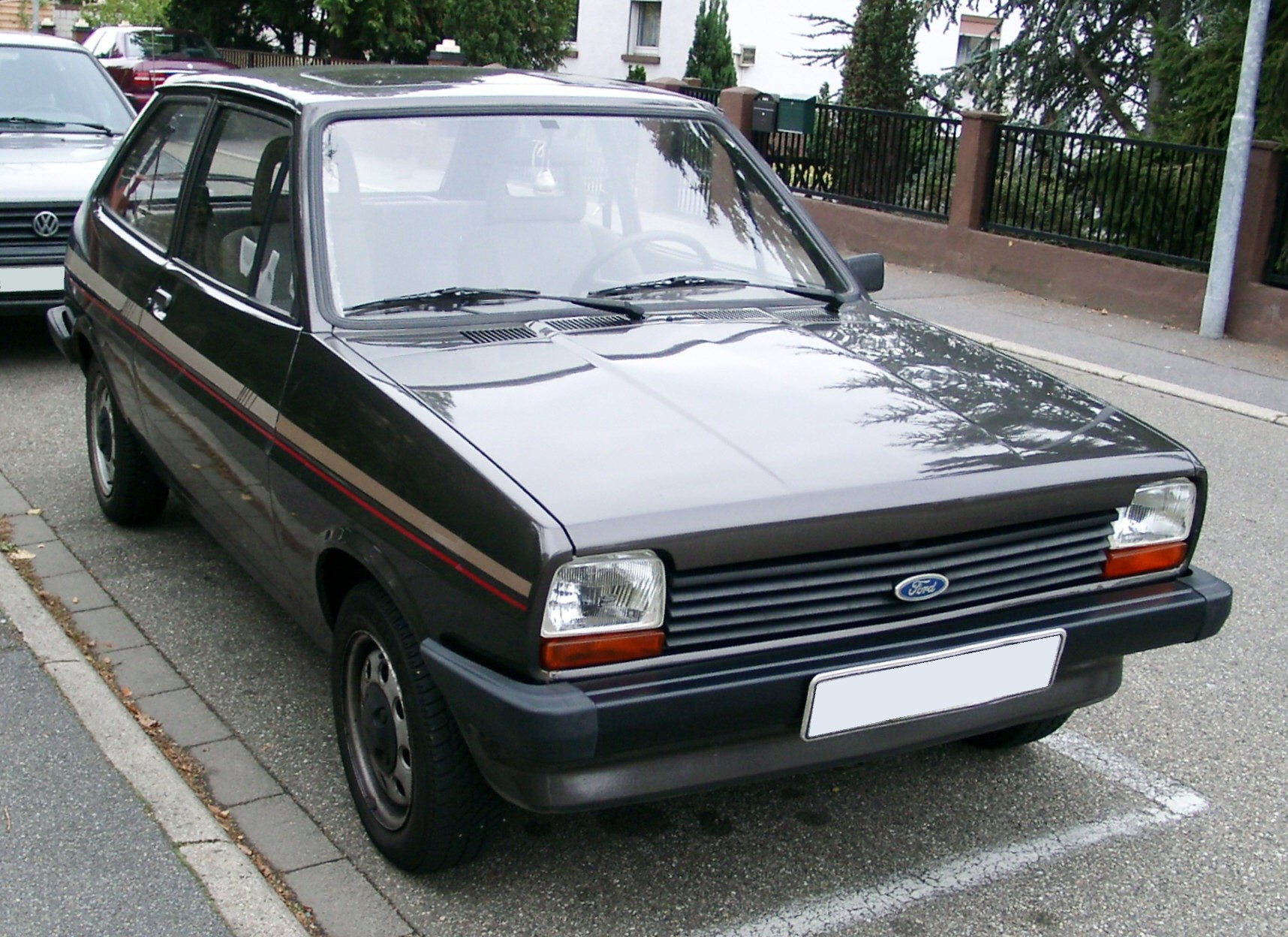 Ford Fiesta MK1